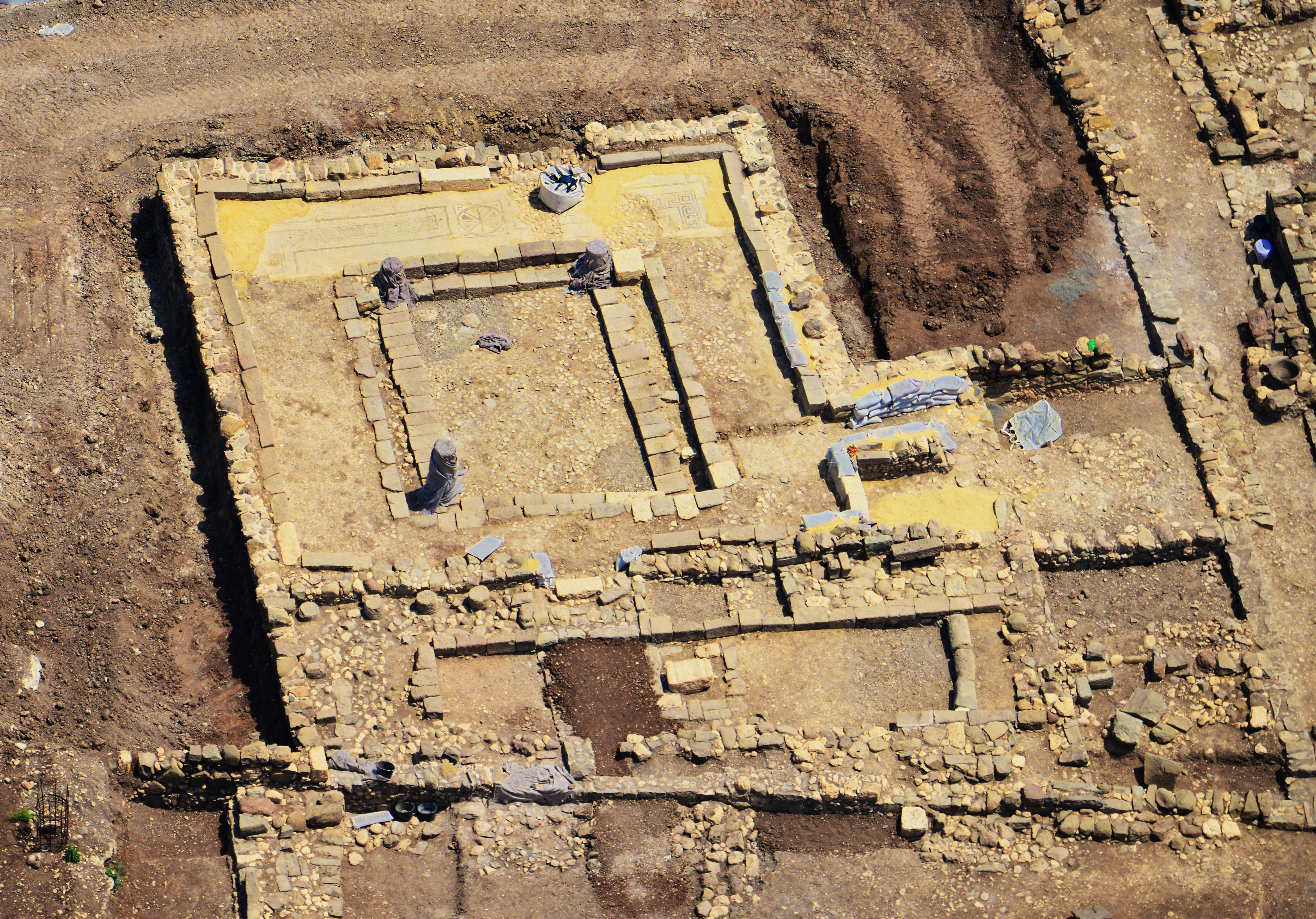 עיר קדומה בגליל, ששכנה לחוף הכנרת, בדרום בקעת גינוסר, סמוך ליישוב מגדל של היום המשמר את שמה. עד להקמת העיר טבריה בשנת 20 לספירה, הייתה מגדלא המרכז העירוני היחיד בחוף המערבי של הכנרת.